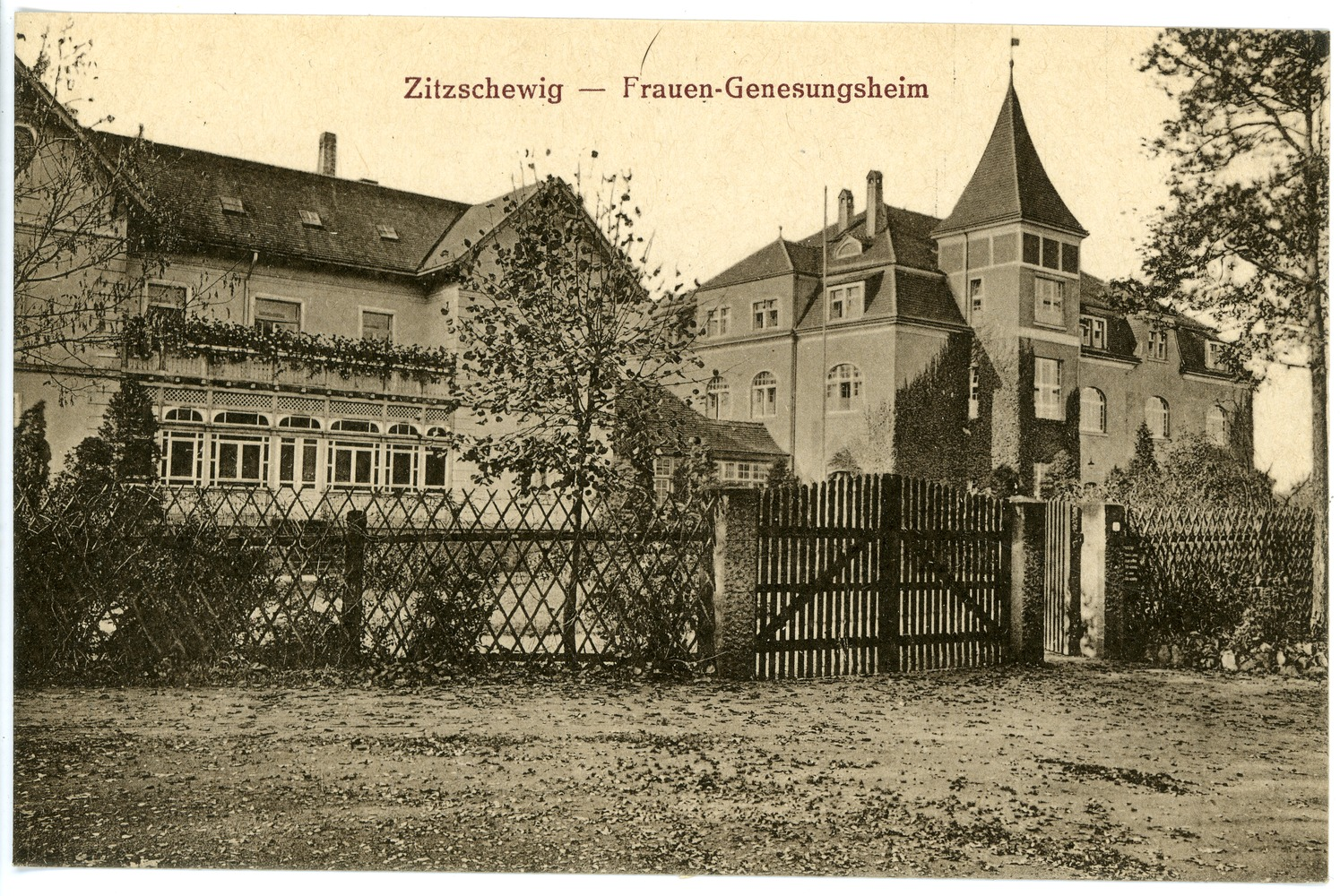 Zitzschewig; Frauengenesungsheim This postcard is from publisher Brück & Sohn in Meißen ( postcard has a unique number 20669 and is available in a higher resolution at the publisher. This images was uploaded in a cooperation project between Wikipedians and the publisher.